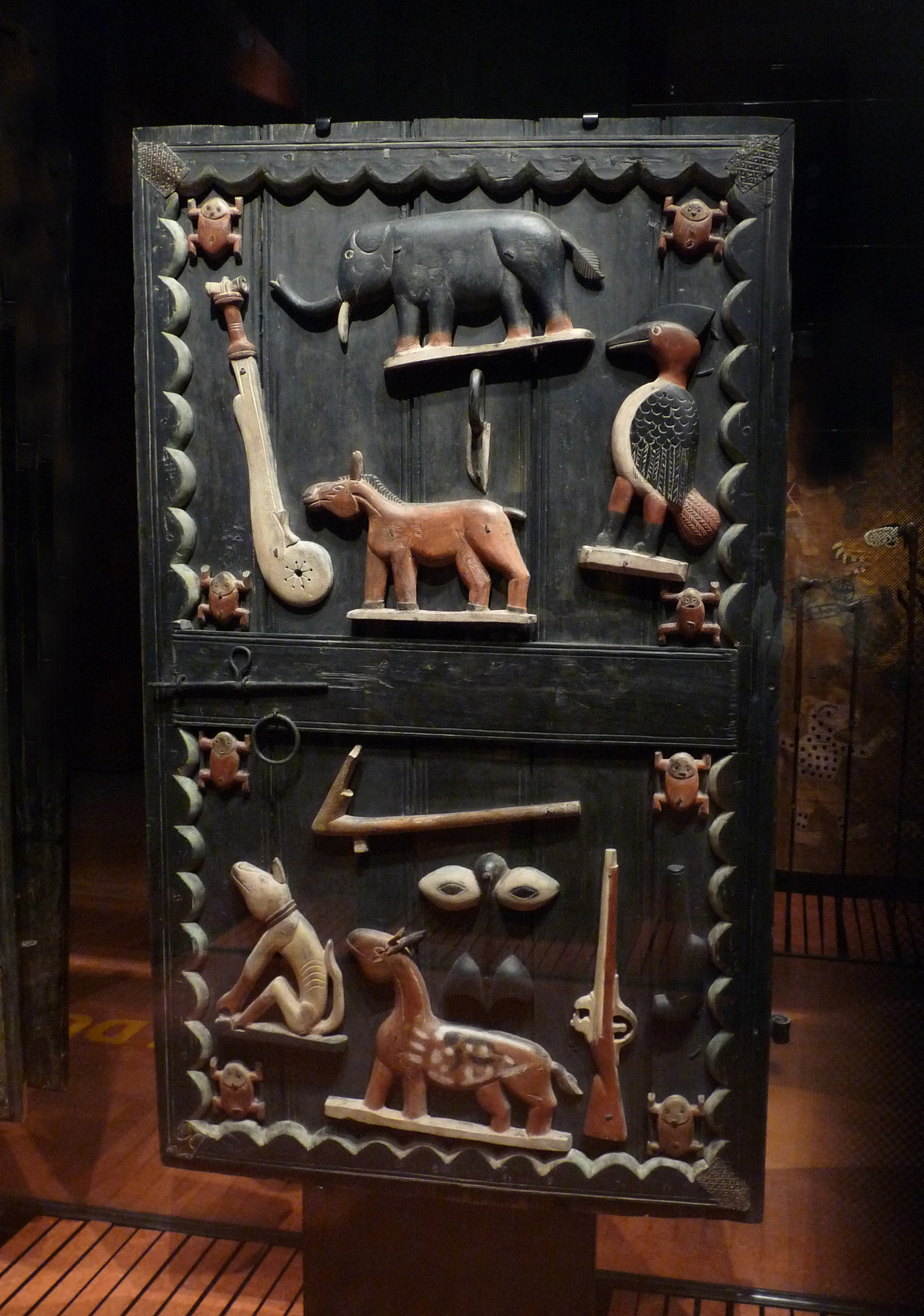 Royaume de Danhomè : portes du palais du roi Glèlè. Attribuées à la famile Sossa Dede. Vers 1880-1889. Musée du quai Branly